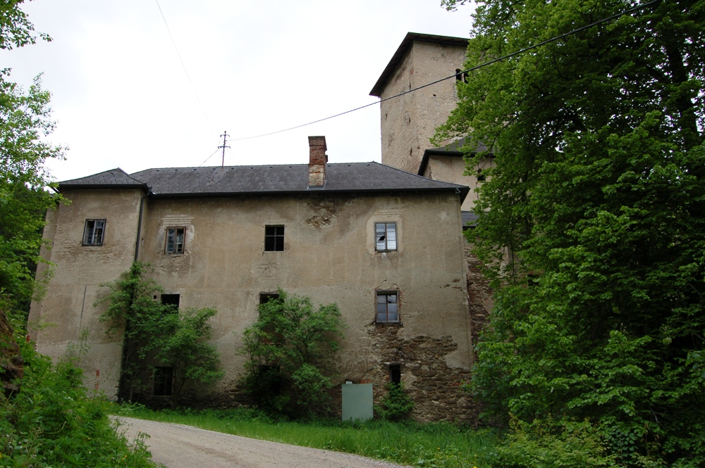 Nordseite Schloss Waldenstein auf Höhe Zufahrtsstraße im Juni 2006